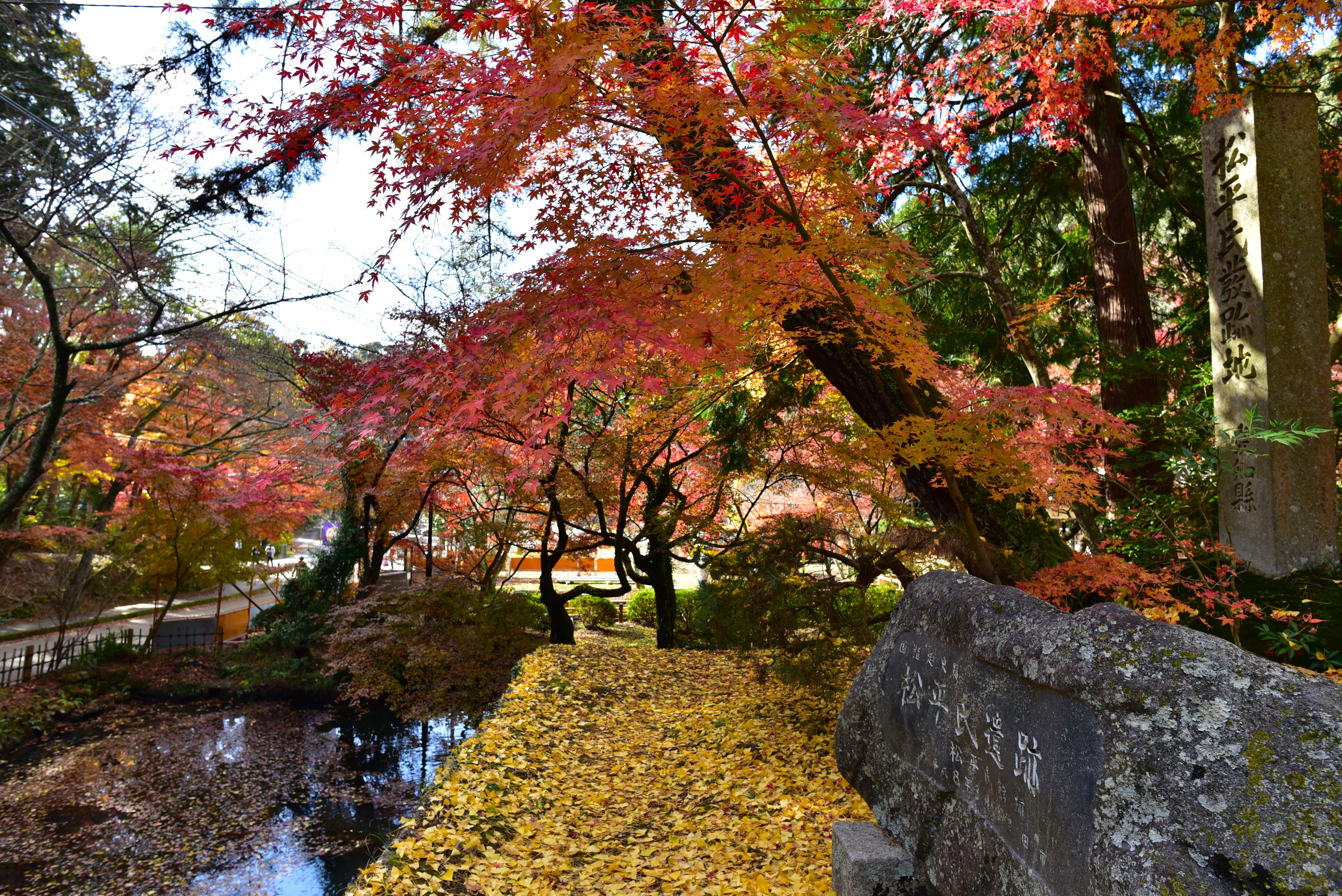 松平氏遺跡の石碑と紅葉